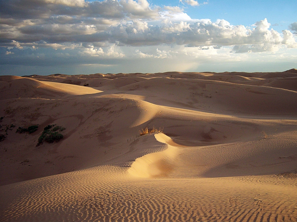 Tomada durante la tercera flickrmeet de Ciudad Juarez, en Samalayuca